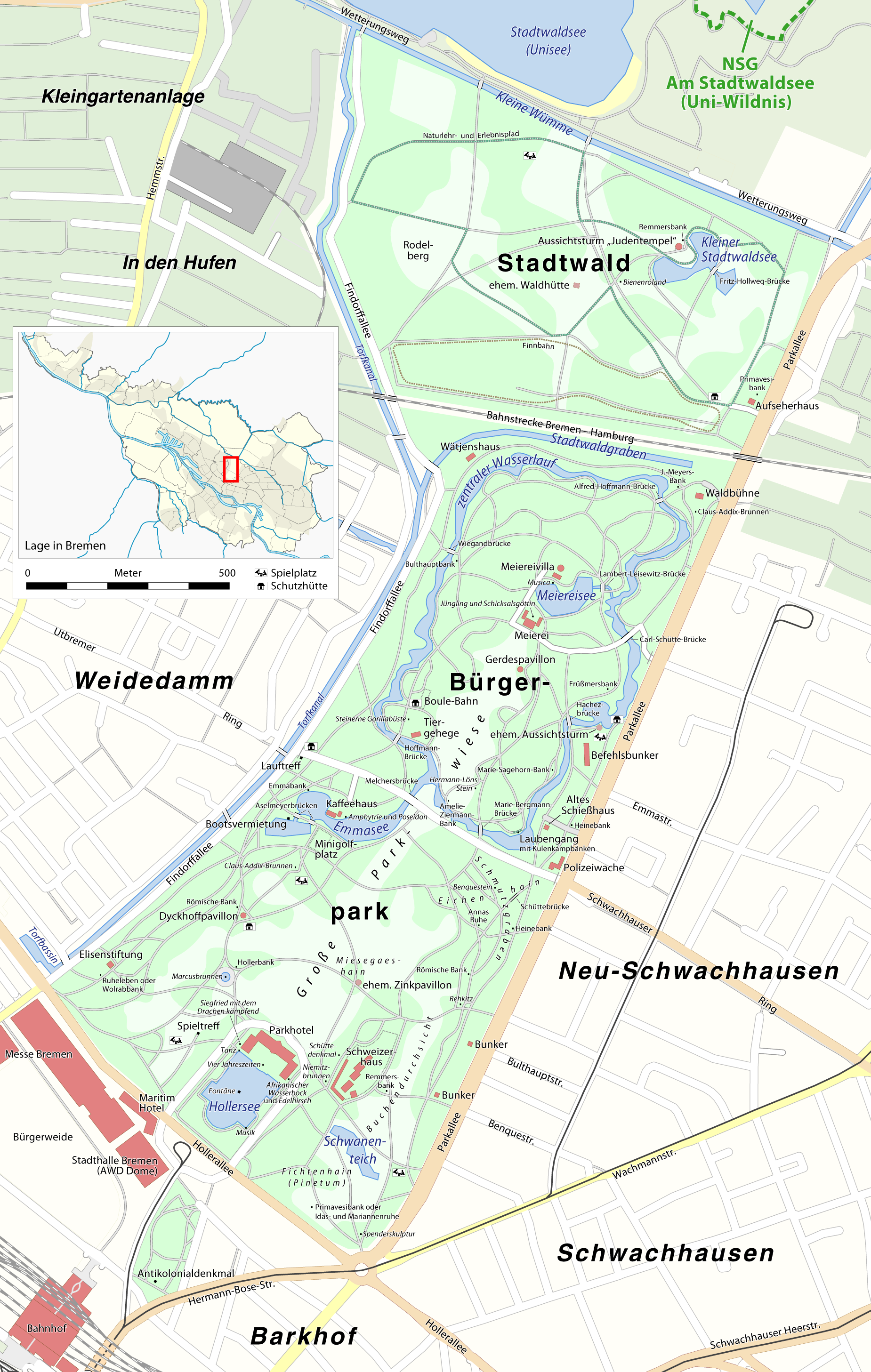 Karte des Bürgerparks und des Stadtwalds in Bremen